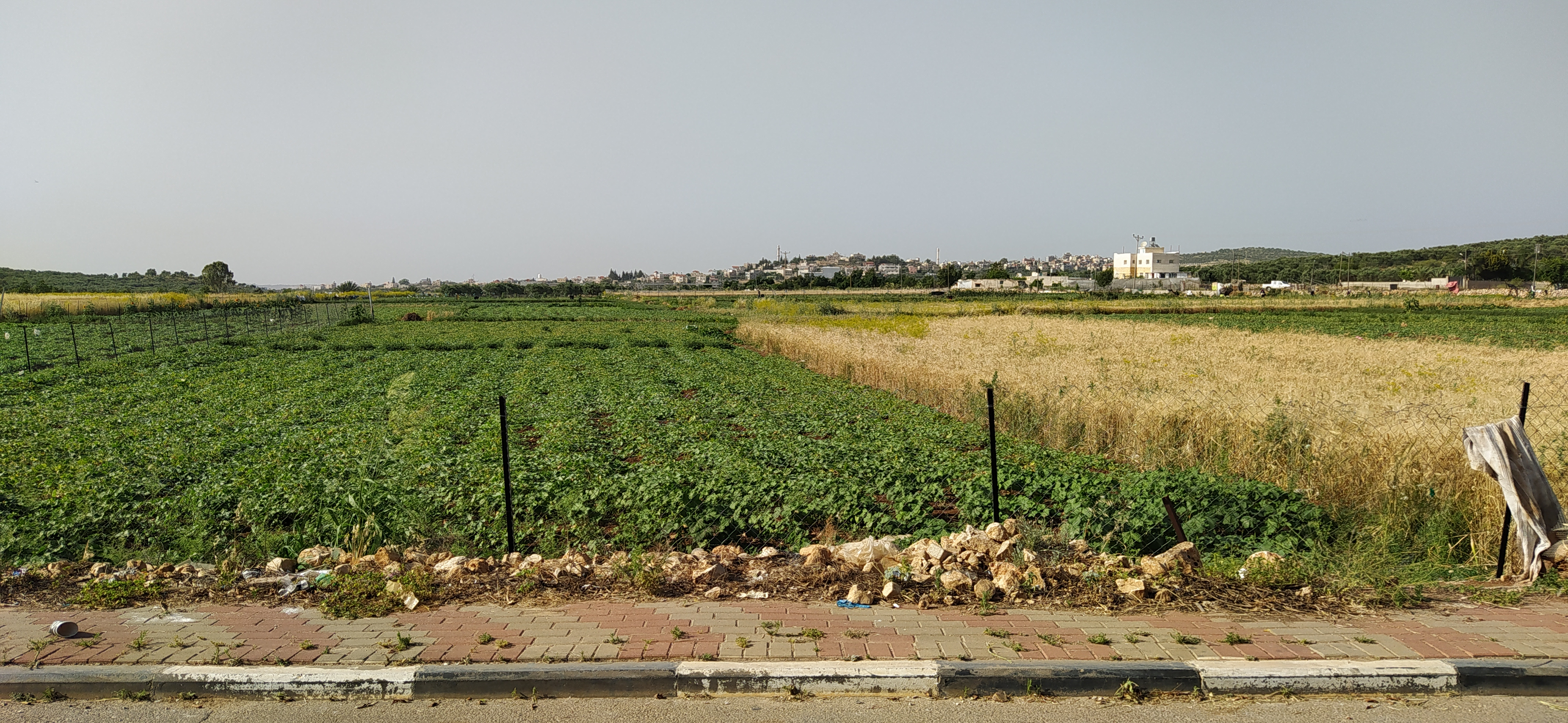 سهل بلدة دير بلوط في محافظة سلفيت الذي يشتهر بزراعة الفقوس والبامية والحمص وفي الخلف تظهر قرية رافات (سلفيت)